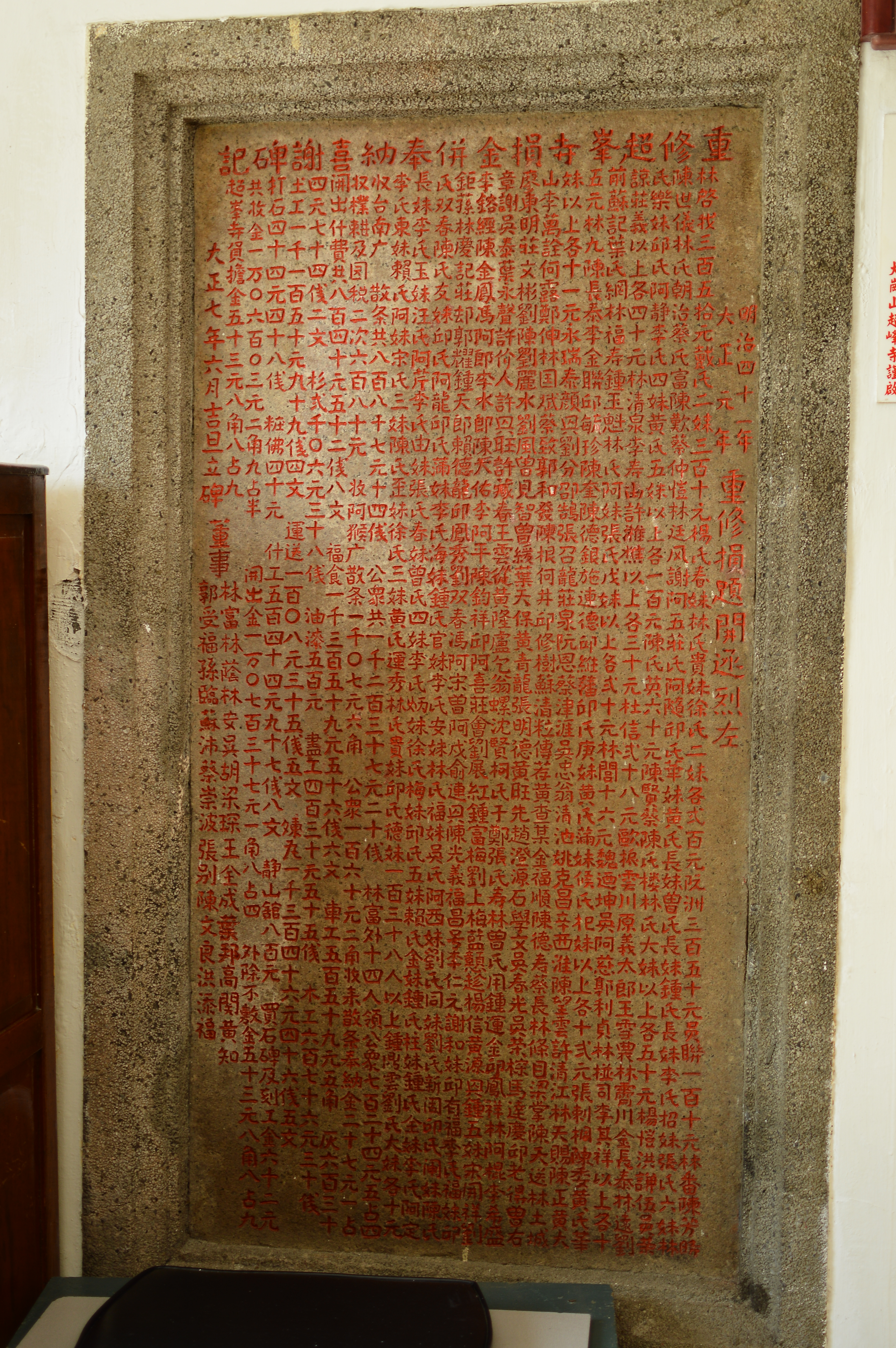 中文（台灣）: 大崗山超峰寺重修超峰寺捐金併奉納喜謝碑記2017